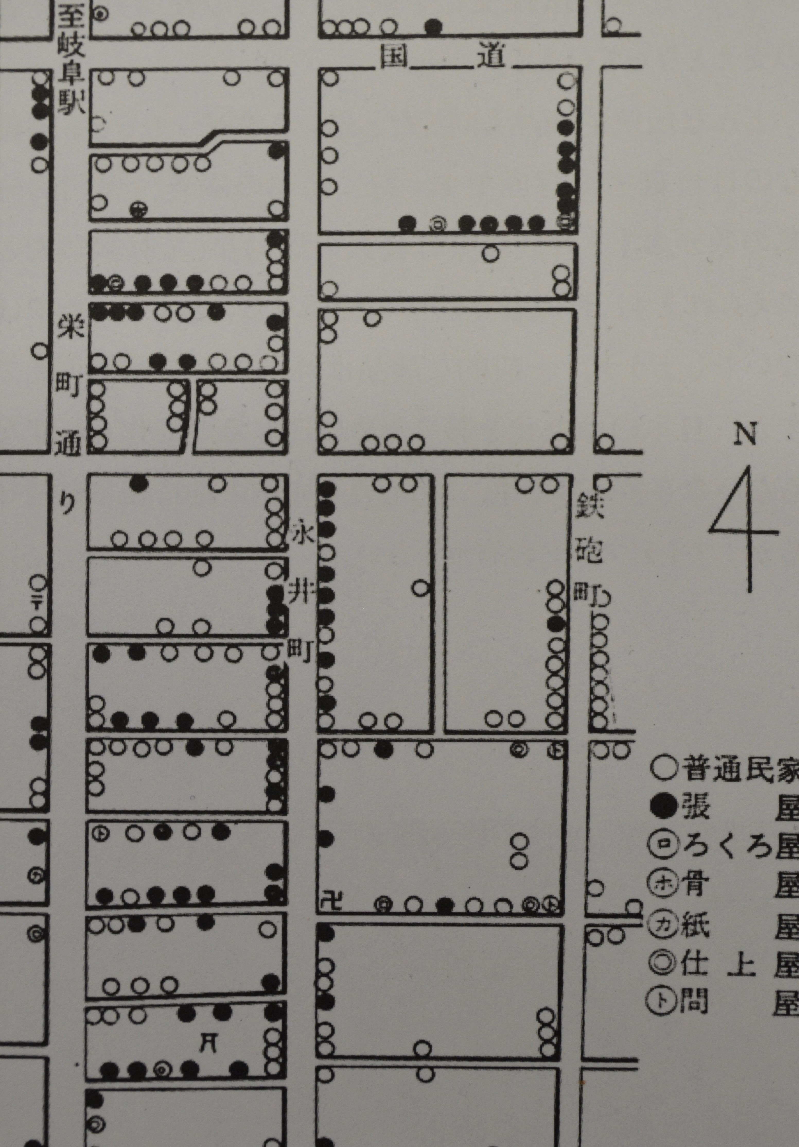 1950年の岐阜和傘（加納和傘）製造業者の分布。